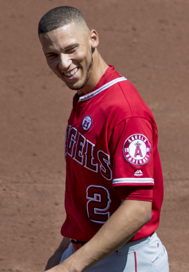 Angels at Orioles 8/20/17